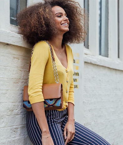 Alicia Haylies portant BHP.